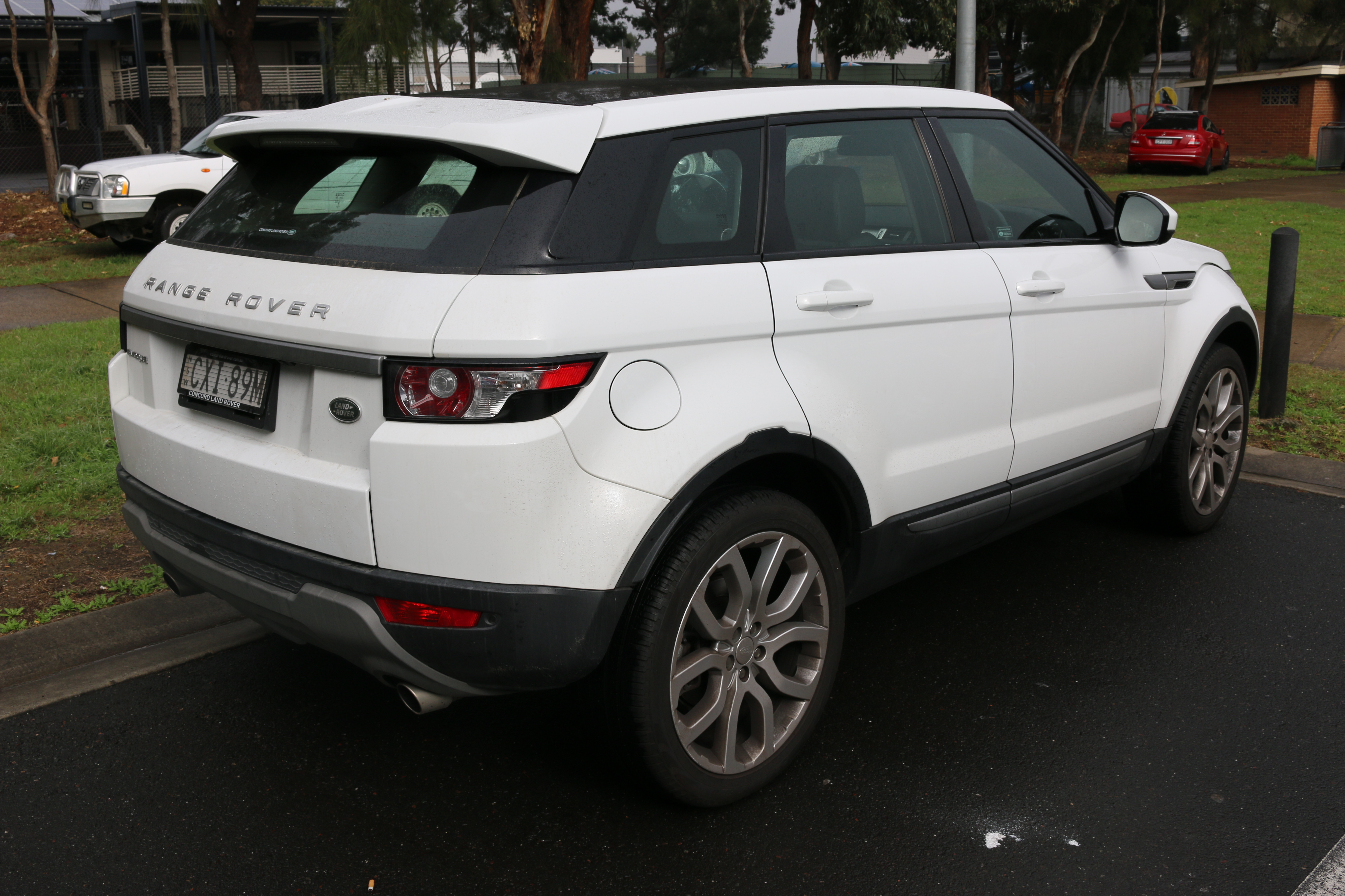 Range Rover Evoque